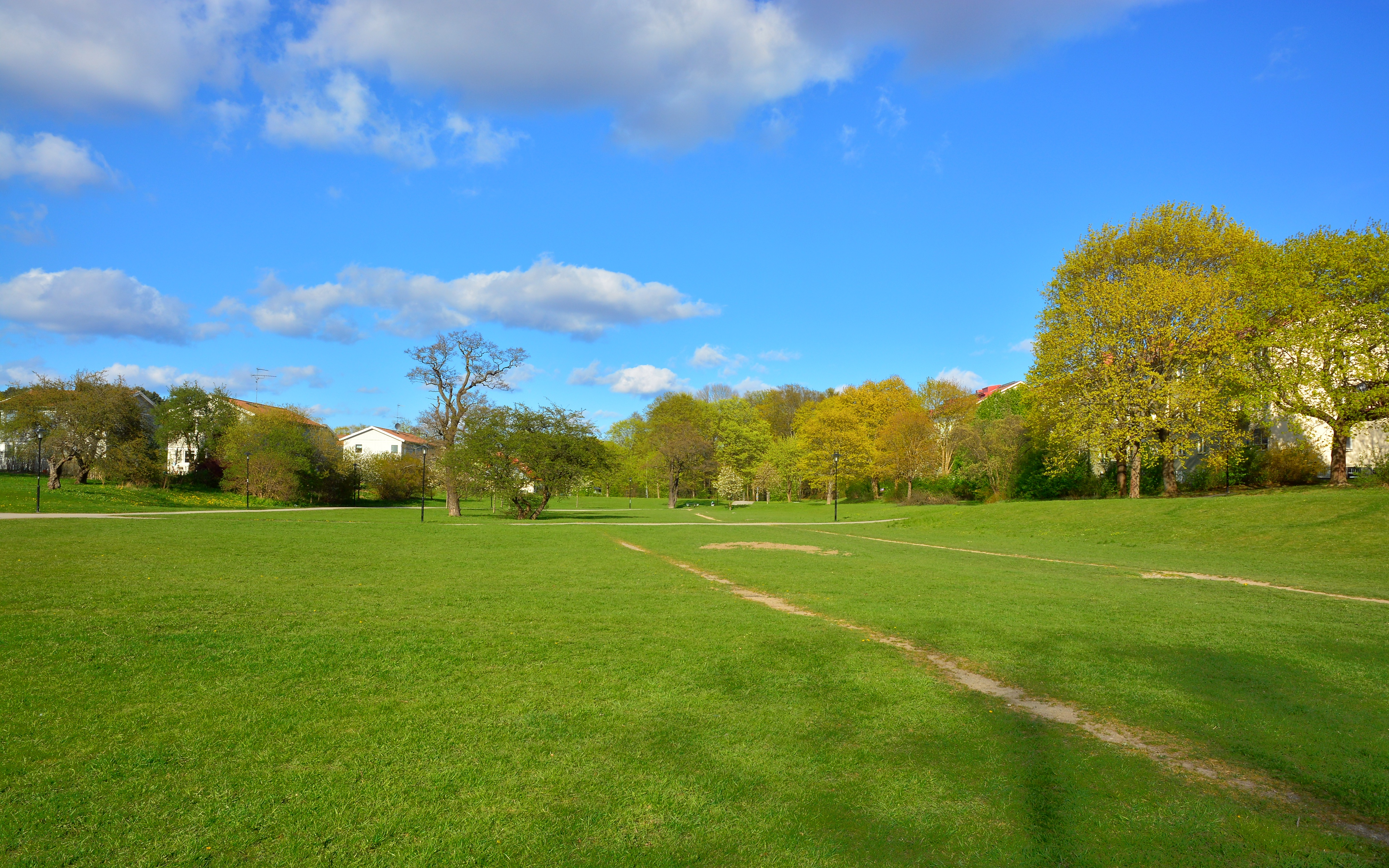 Storängsparken i Årsta, södra Stockholm.